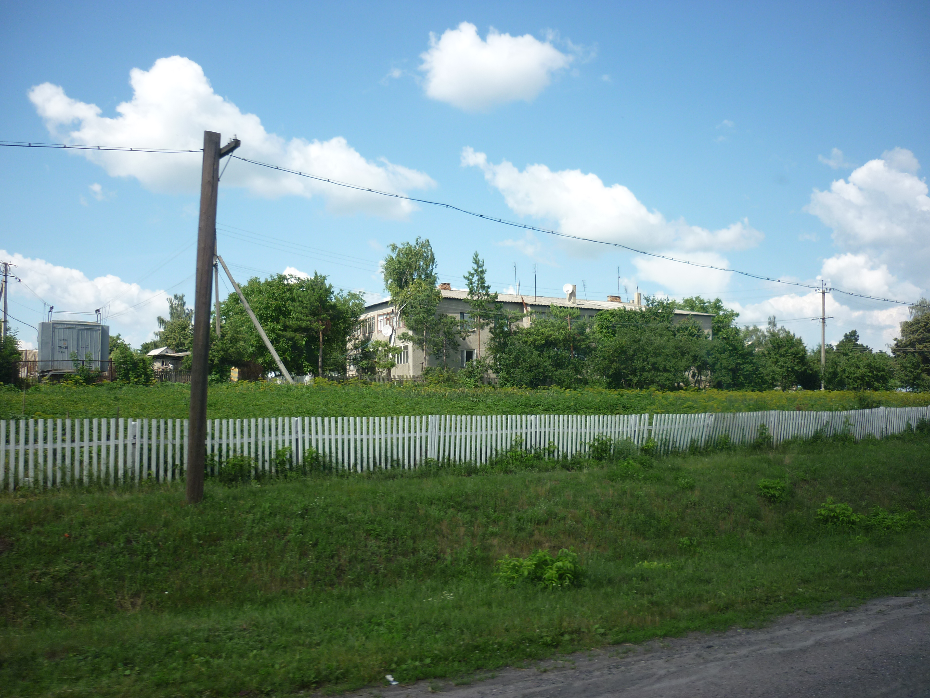 Село Гусакове, Уманський район: Новобудови в селі